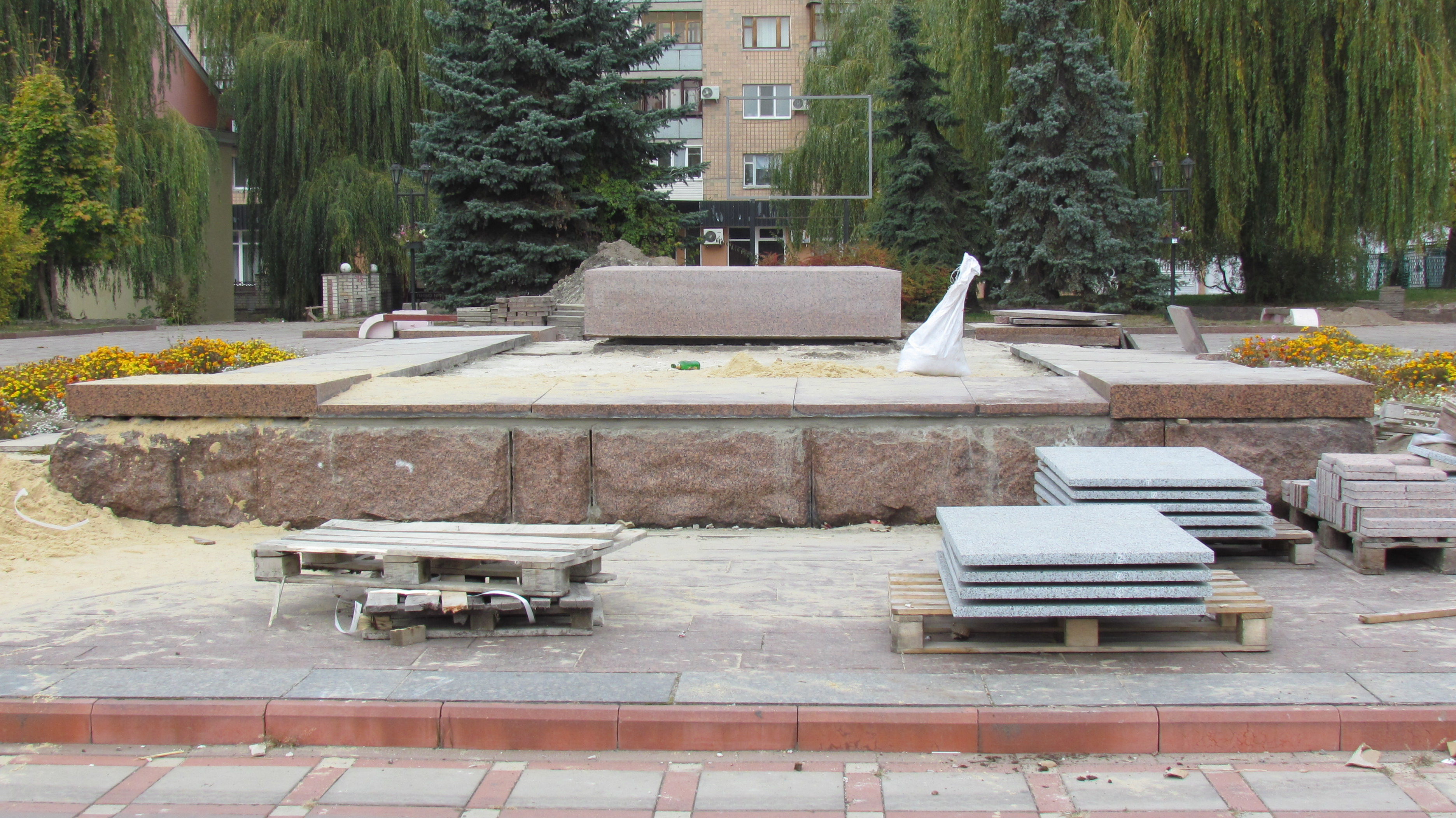 Пам'ятник Леніну В. І., Коростень, вул. Грушевського, біля Міської Ради